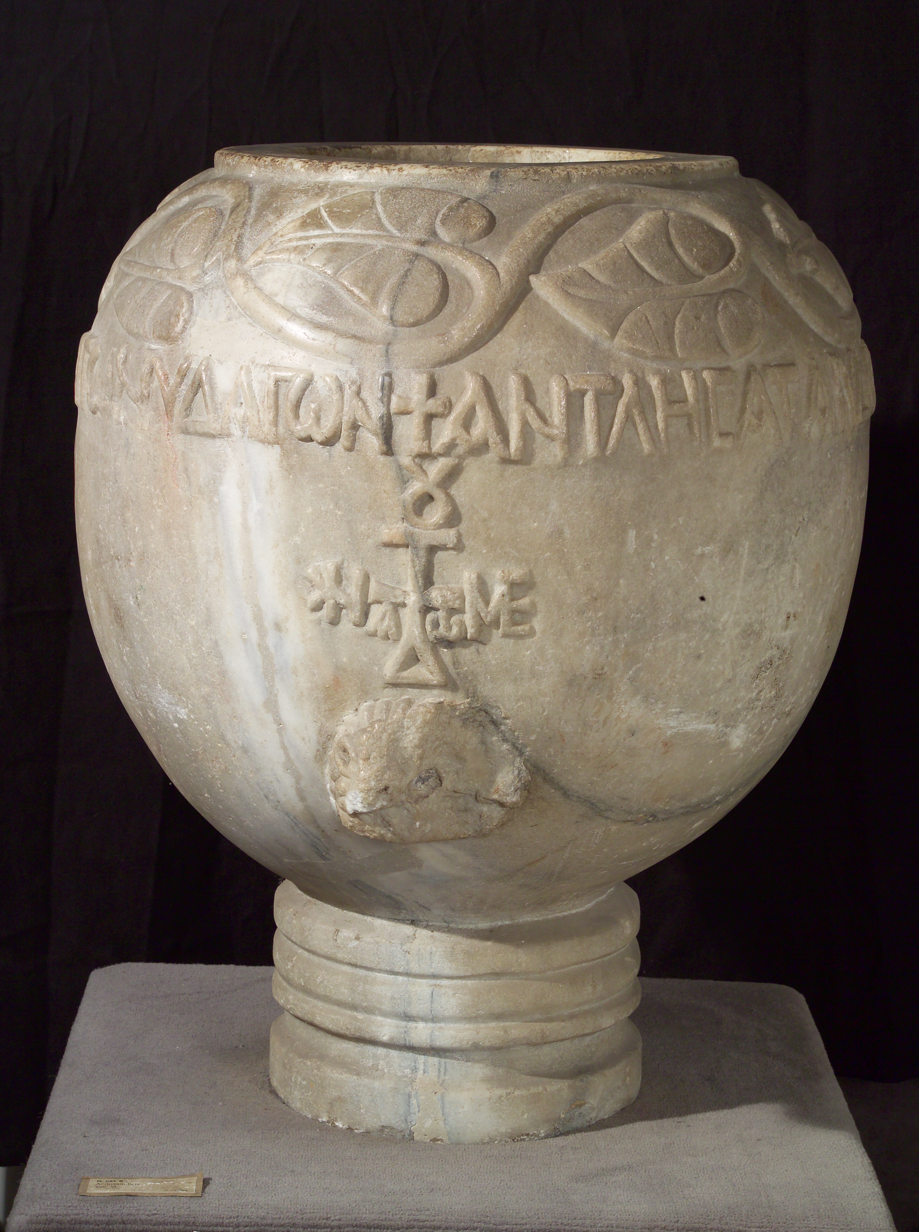 Acquasantiere presente al Museo del Torcello